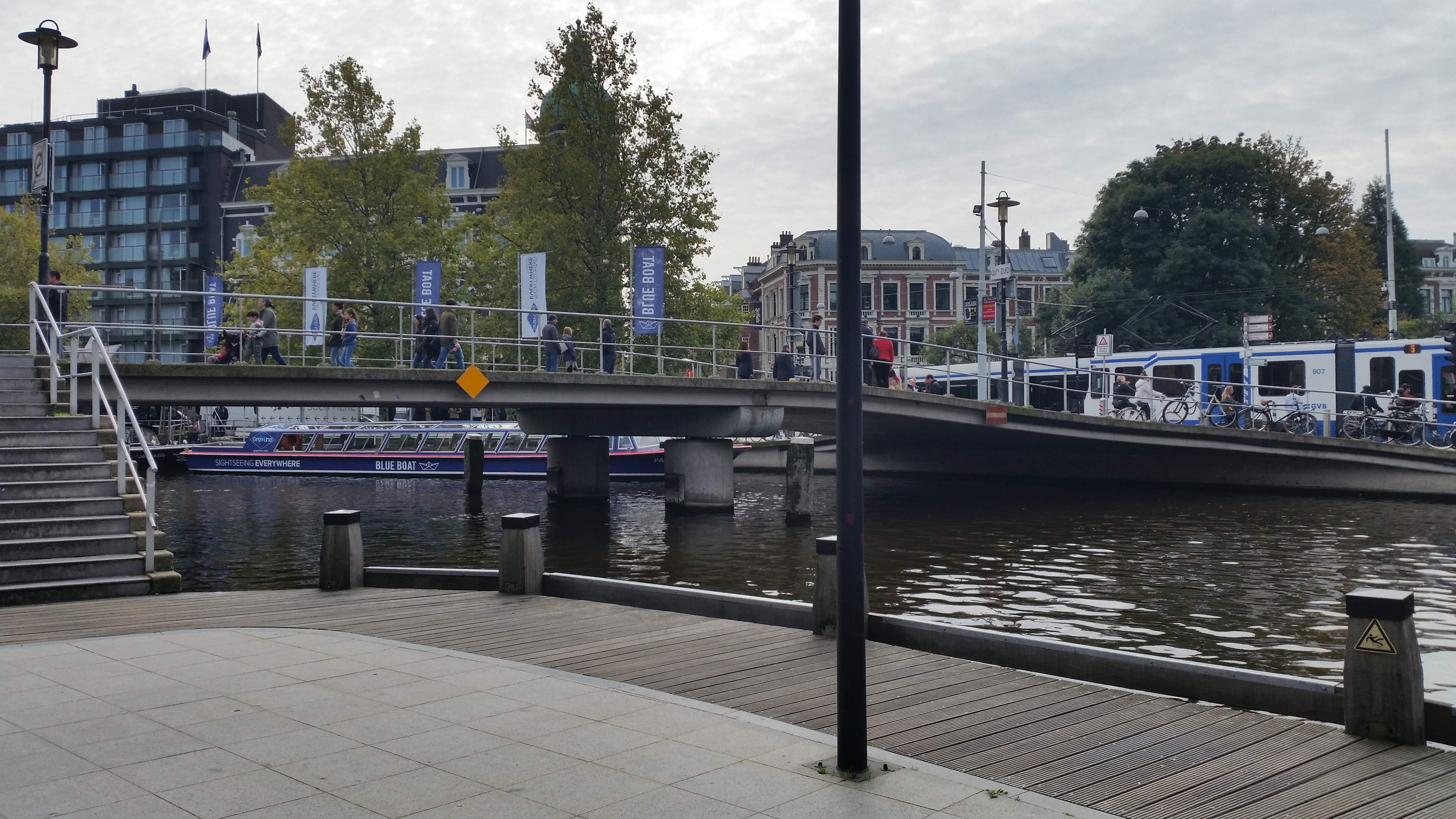 Zijaanzicht van Brug 1922, Hein Donnerbrug